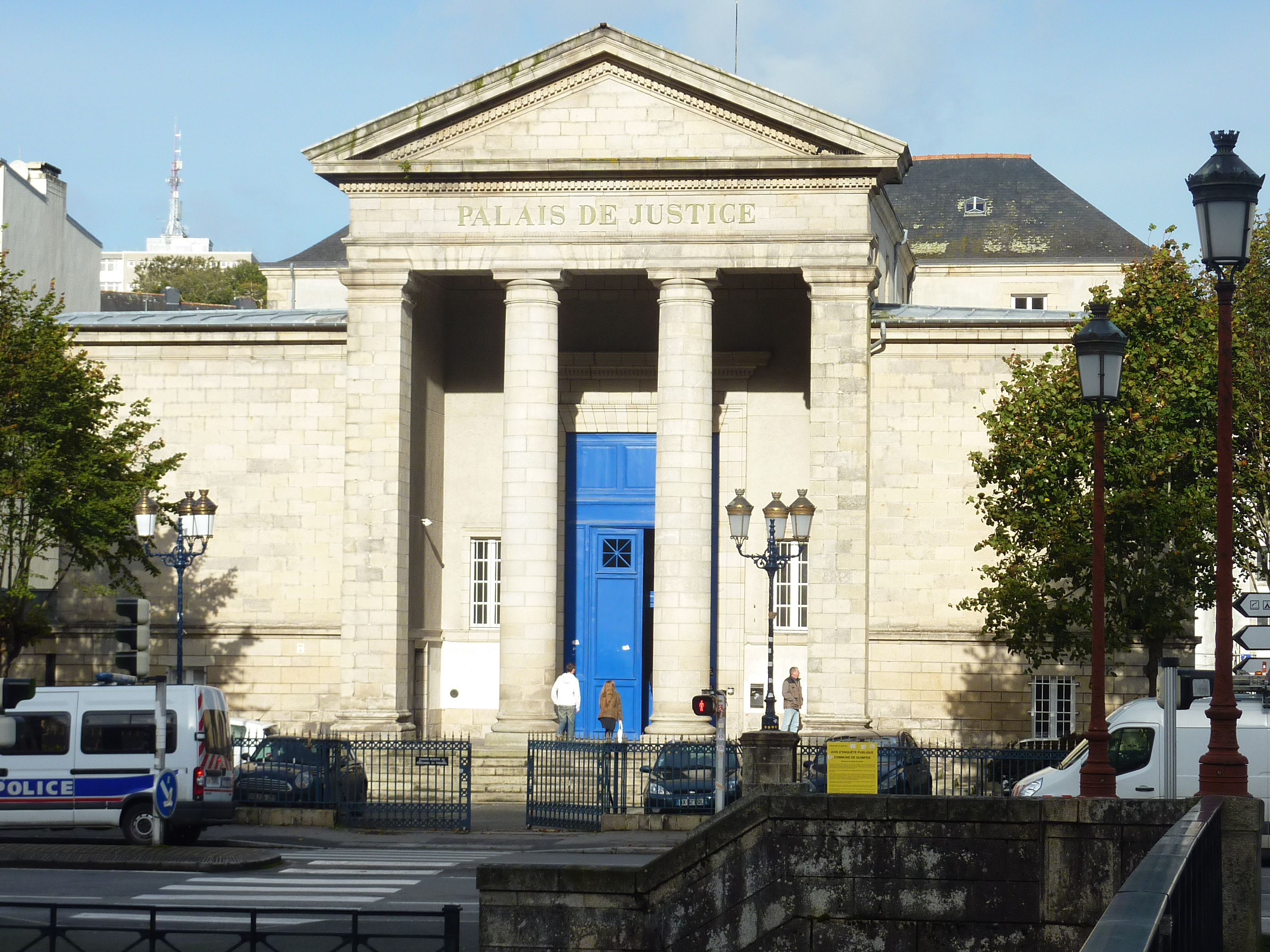 Quimper : le Tribunal de Grande instance ("Palais de Justice") sur la rive droite de l'Odet